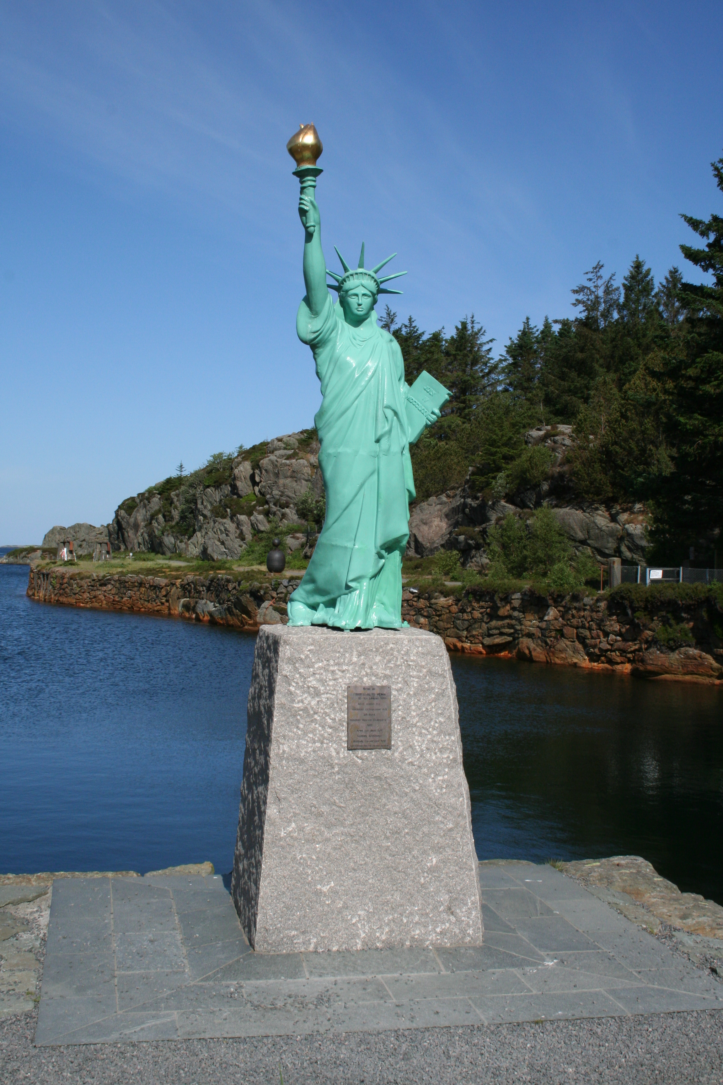 Freiheitsstatue vor der ehemaligen Kupfergrube in Visnes, Karmøy, Norwegen